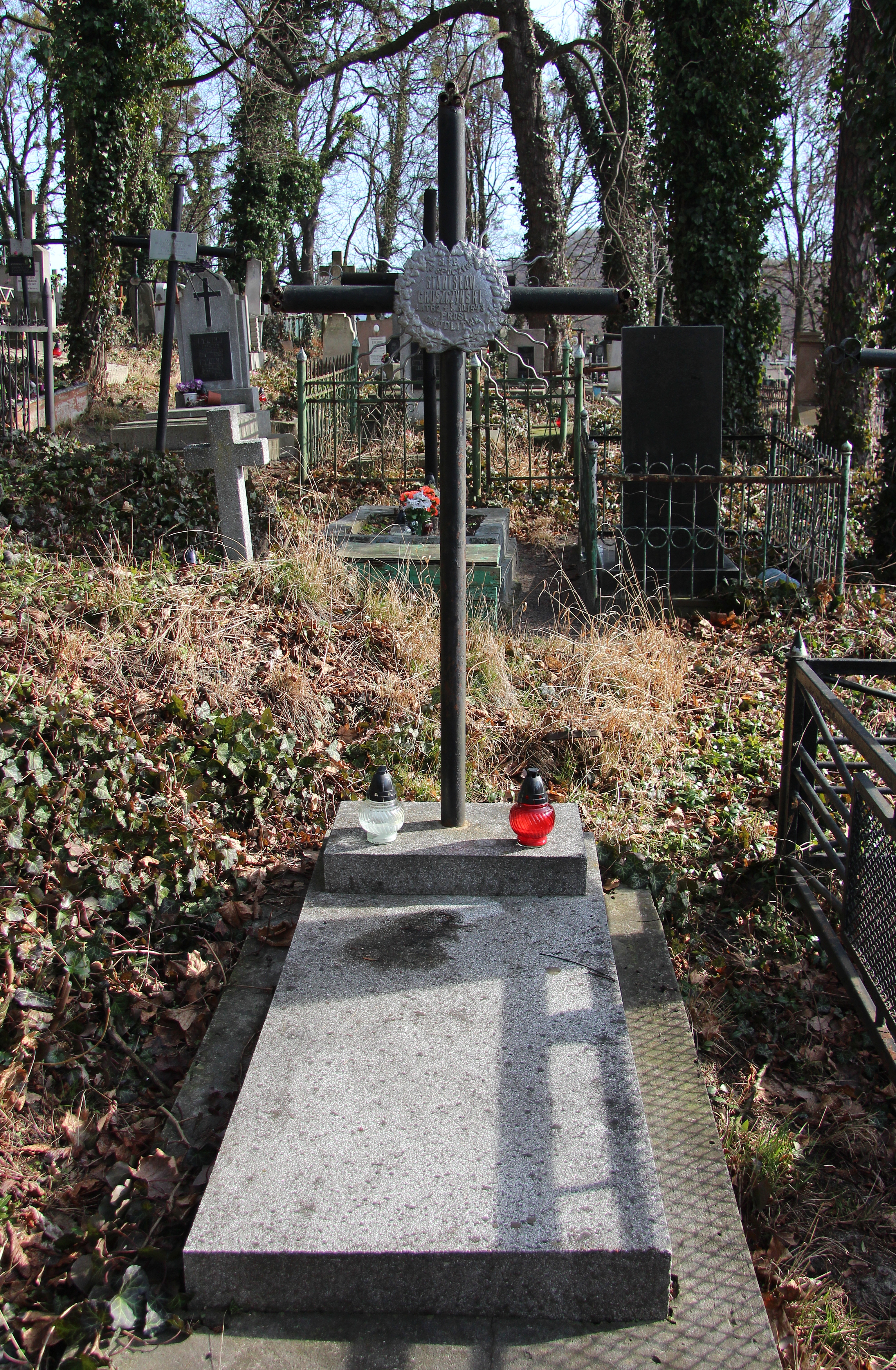 Могила Станіслава Грущинського.Личаківський цвинтар , поле № 35.